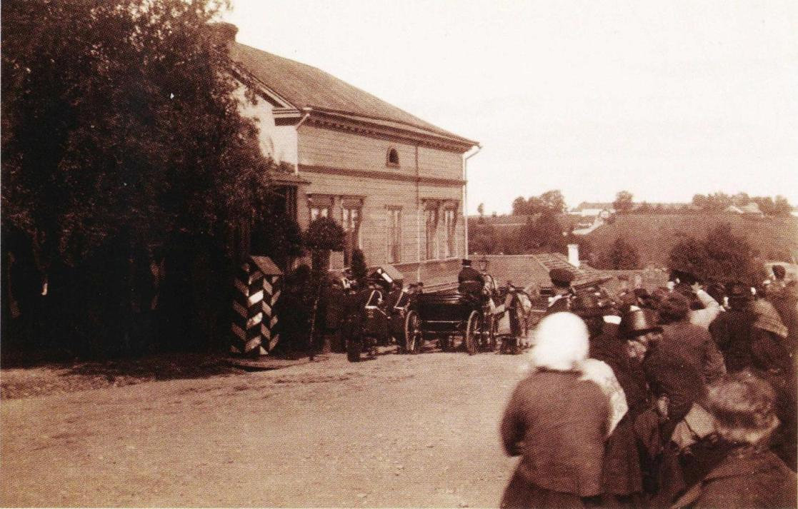 Keisari Aleksanteri III saapumassa Lappeenrannan Keisarintaloon.